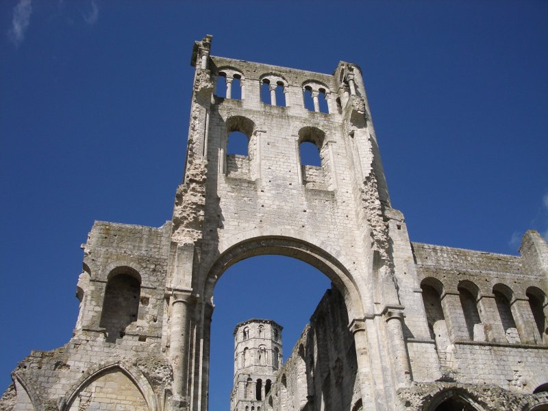 Les ruines de l'abbaye de Jumièges